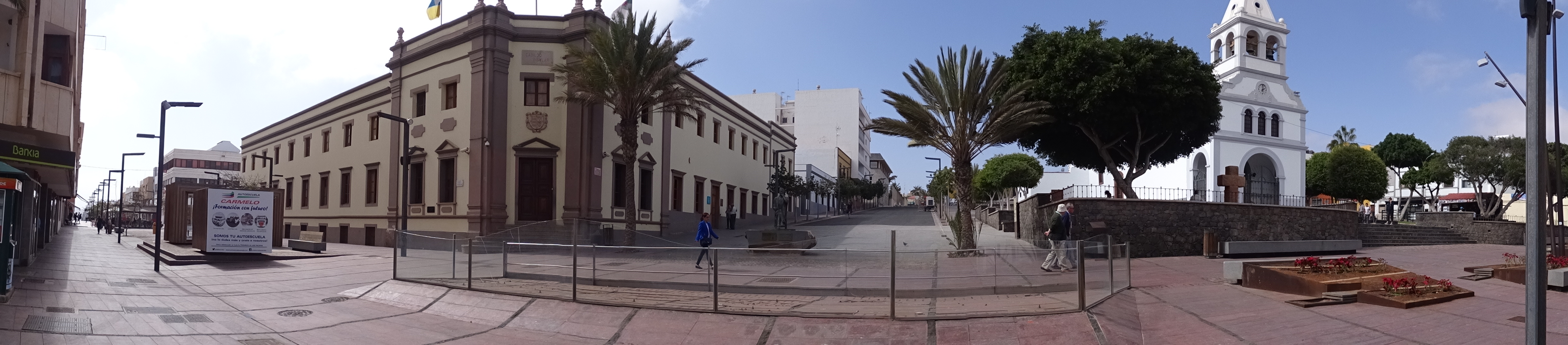 náměstí